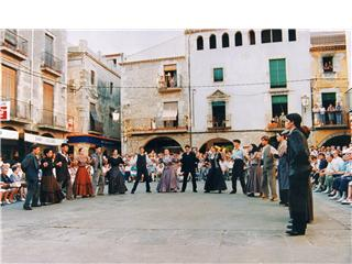 Exemple de contrapàs